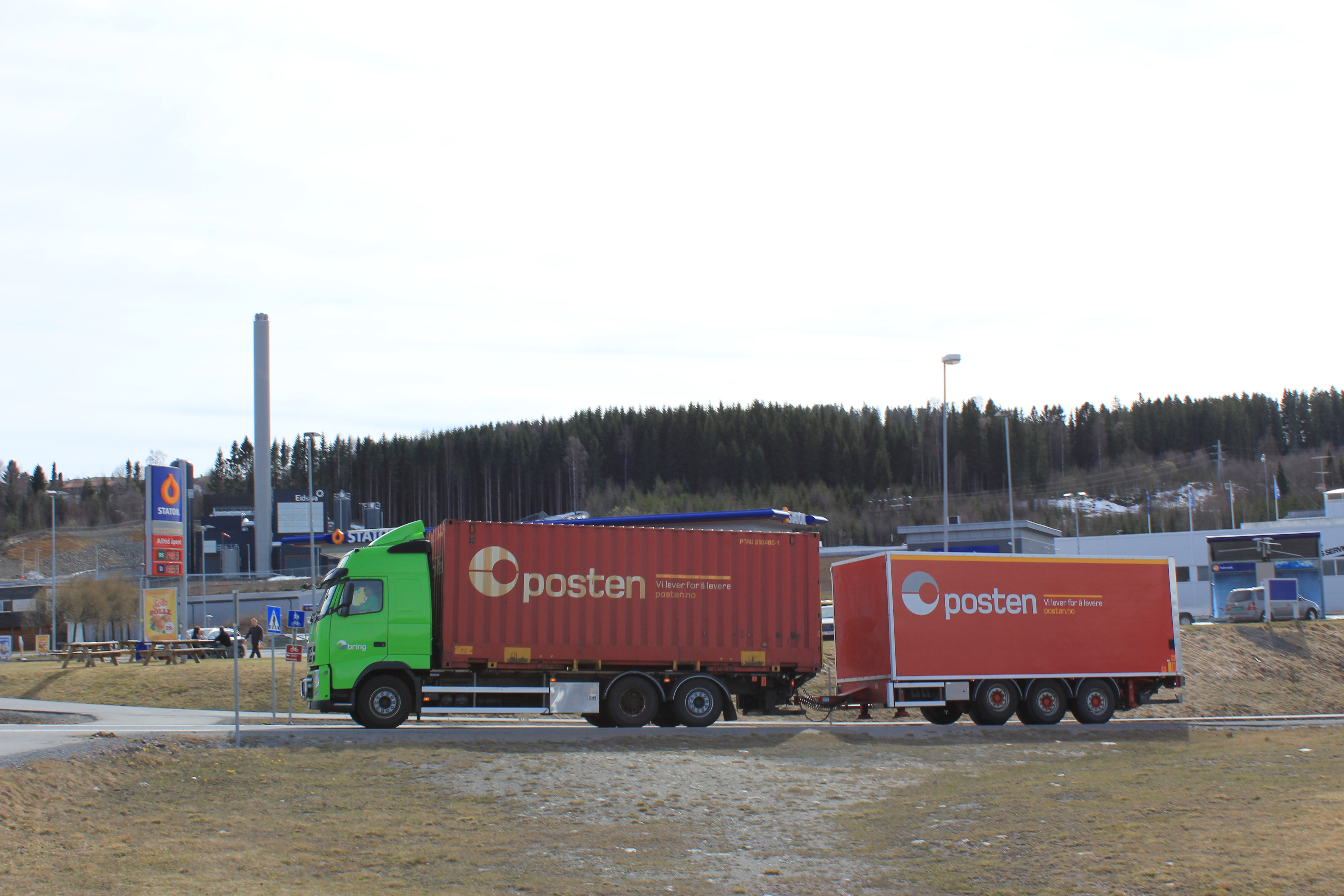 Kallerud ved Gjøvik, et industri- og kjøpesenterområde før man ankommer Gjøvik sentrum ved Riksveg 4 sørfra.